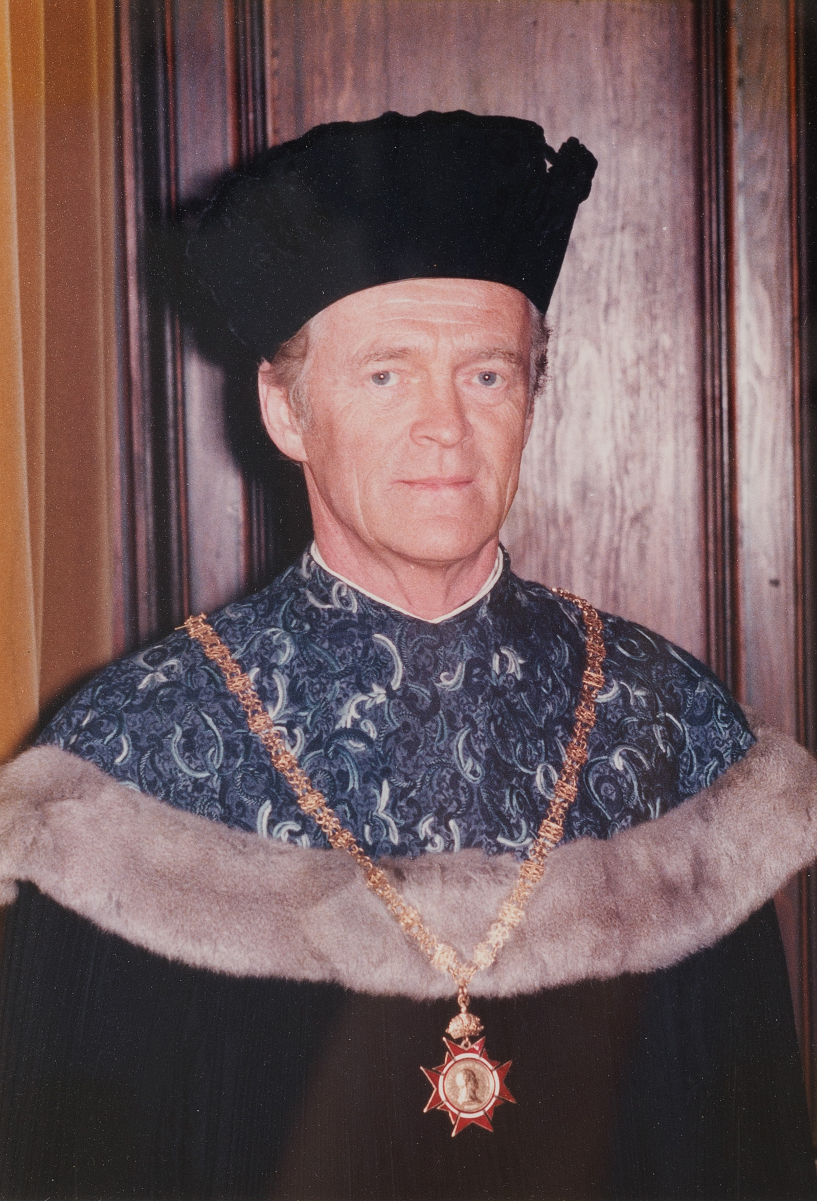 Univ.Prof.DDDDr.Ludwig Prokop